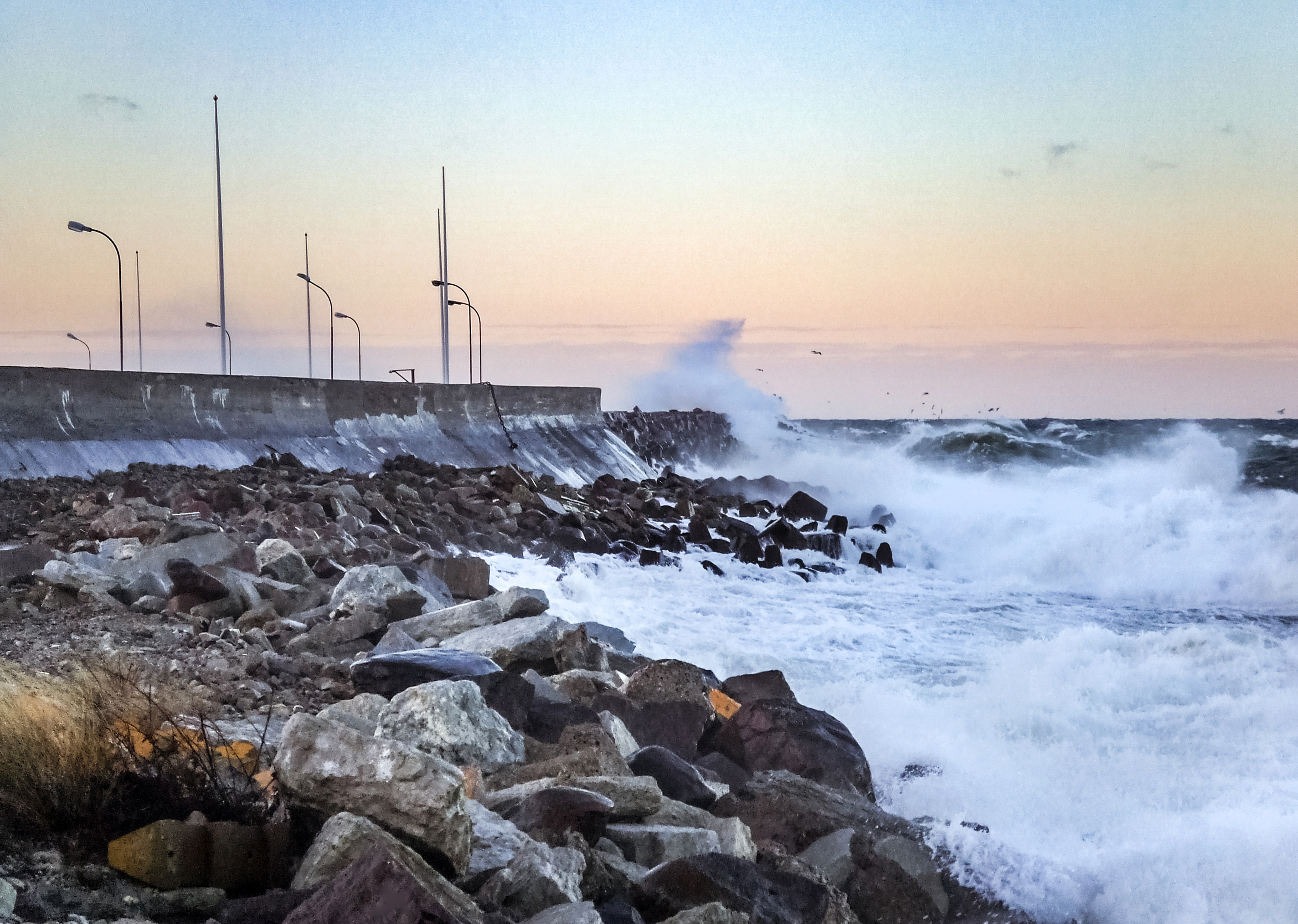 Storm vid yttre vågbrytaren i Visby hamn, Gotland